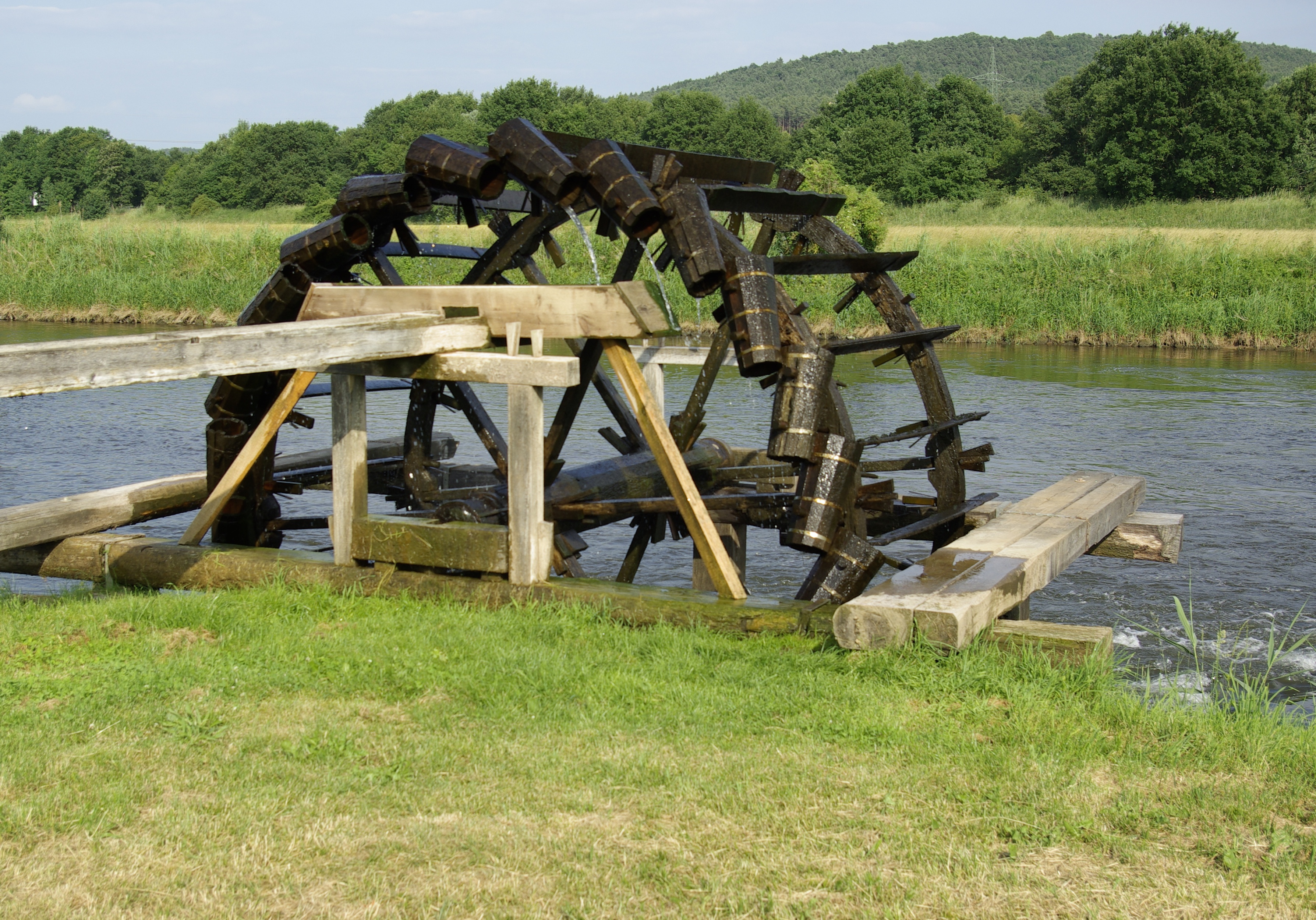 Schöpfrad Bauernrad an der Regnitz in Möhrendorf.